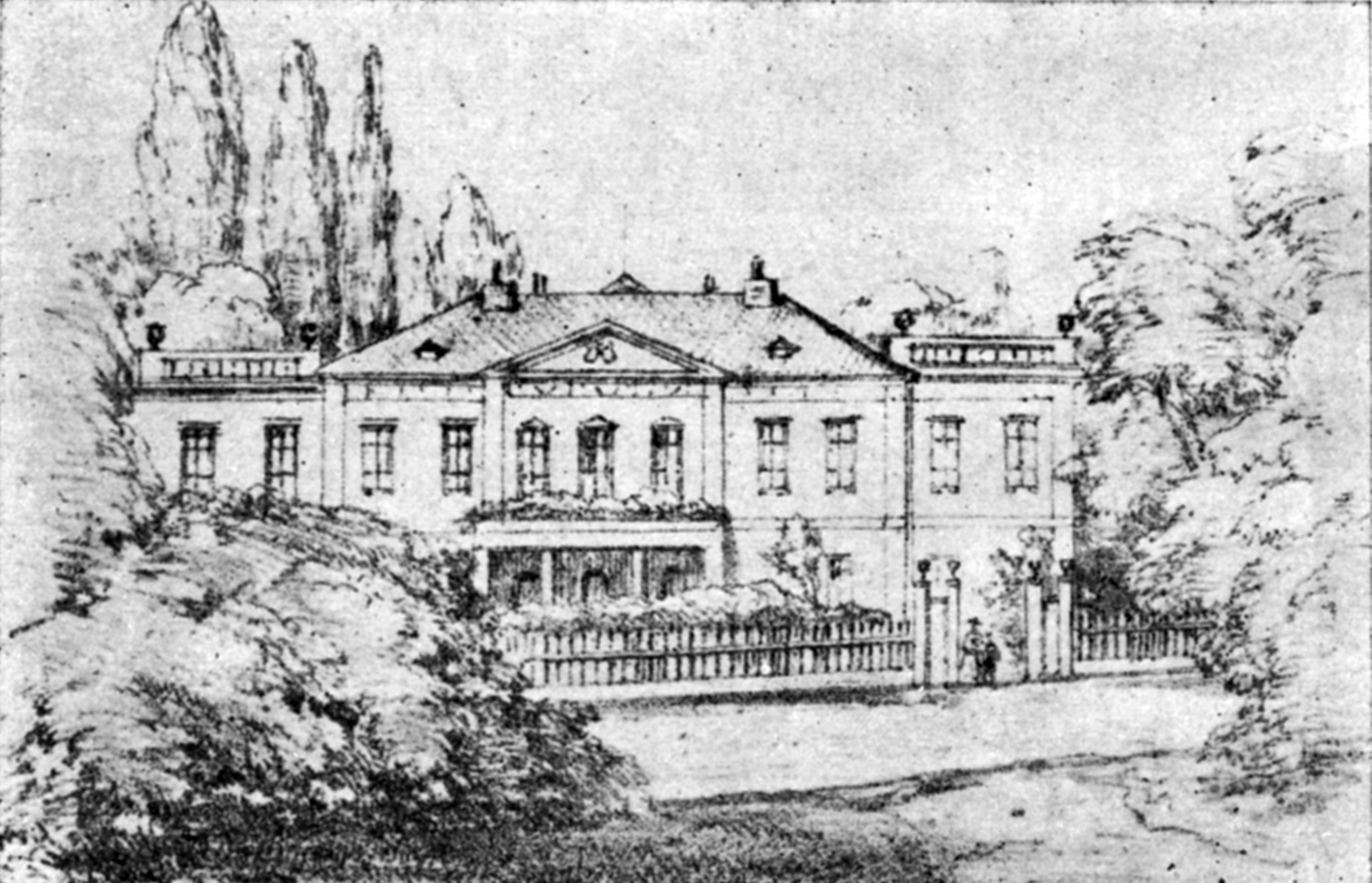 Baden bei Wien, Reginensruhe (Villa Bylandt-Rheydt), Helenenstraße 19–21